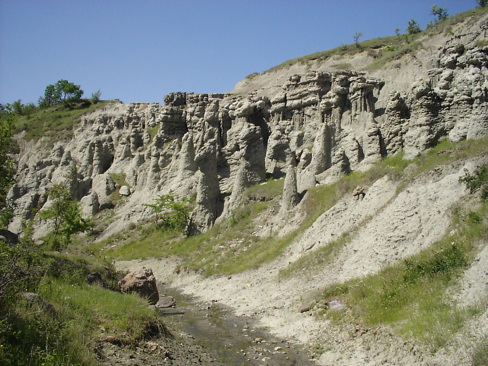 Земјени пирамиди во Куклица, на источната страна на возвишението Забел. Фотографирал: Милевски, 2001 година